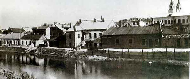 вул. Зыбіцкая